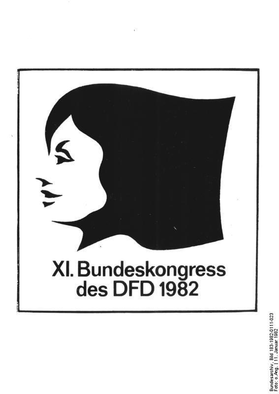 ADN-ZB Repro-11.1.82-ks-Berlin-Emblem des XI. Bundeskongresses des DFD 1982.